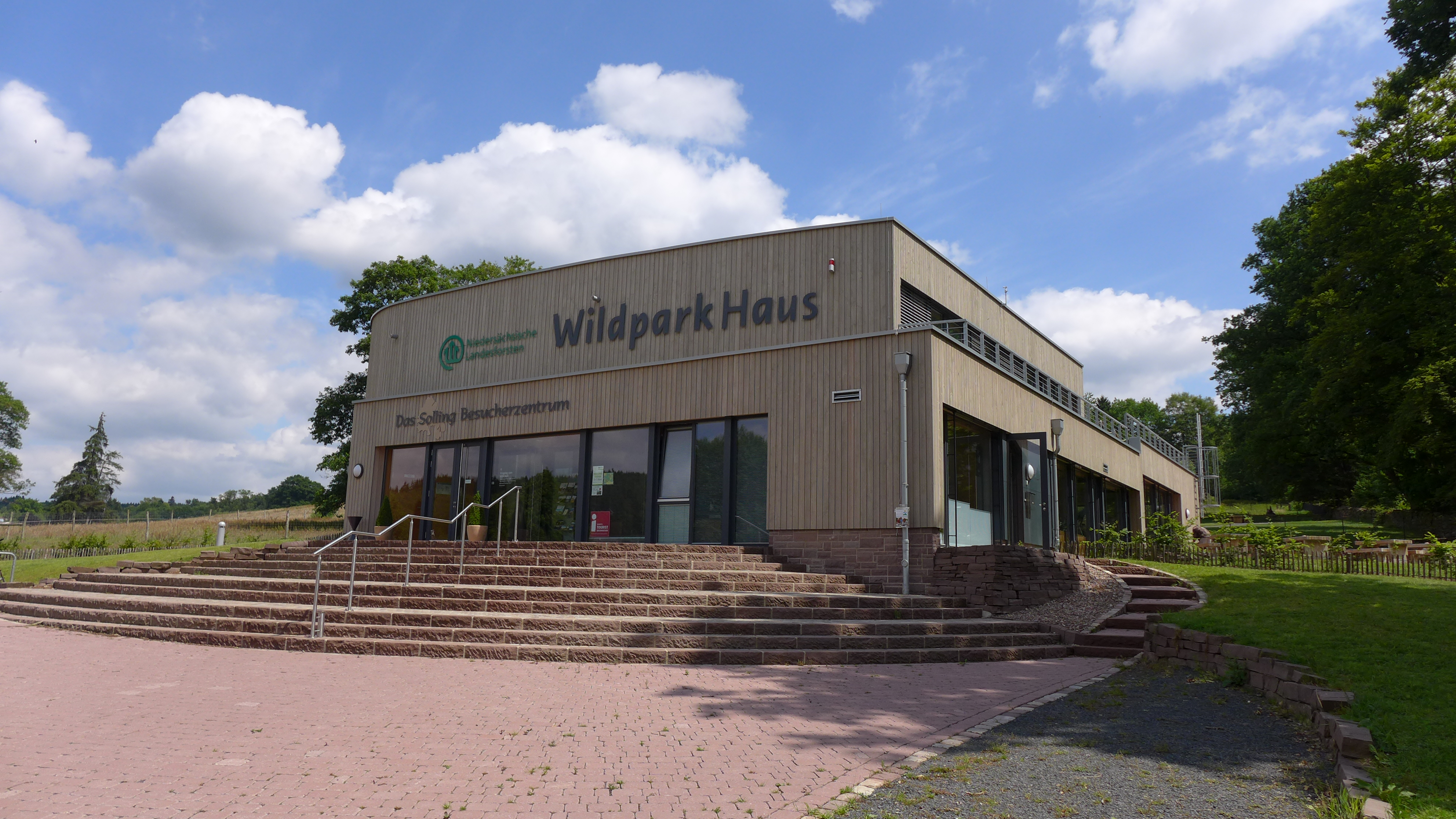 Gebäude am Wildpark Neuhaus